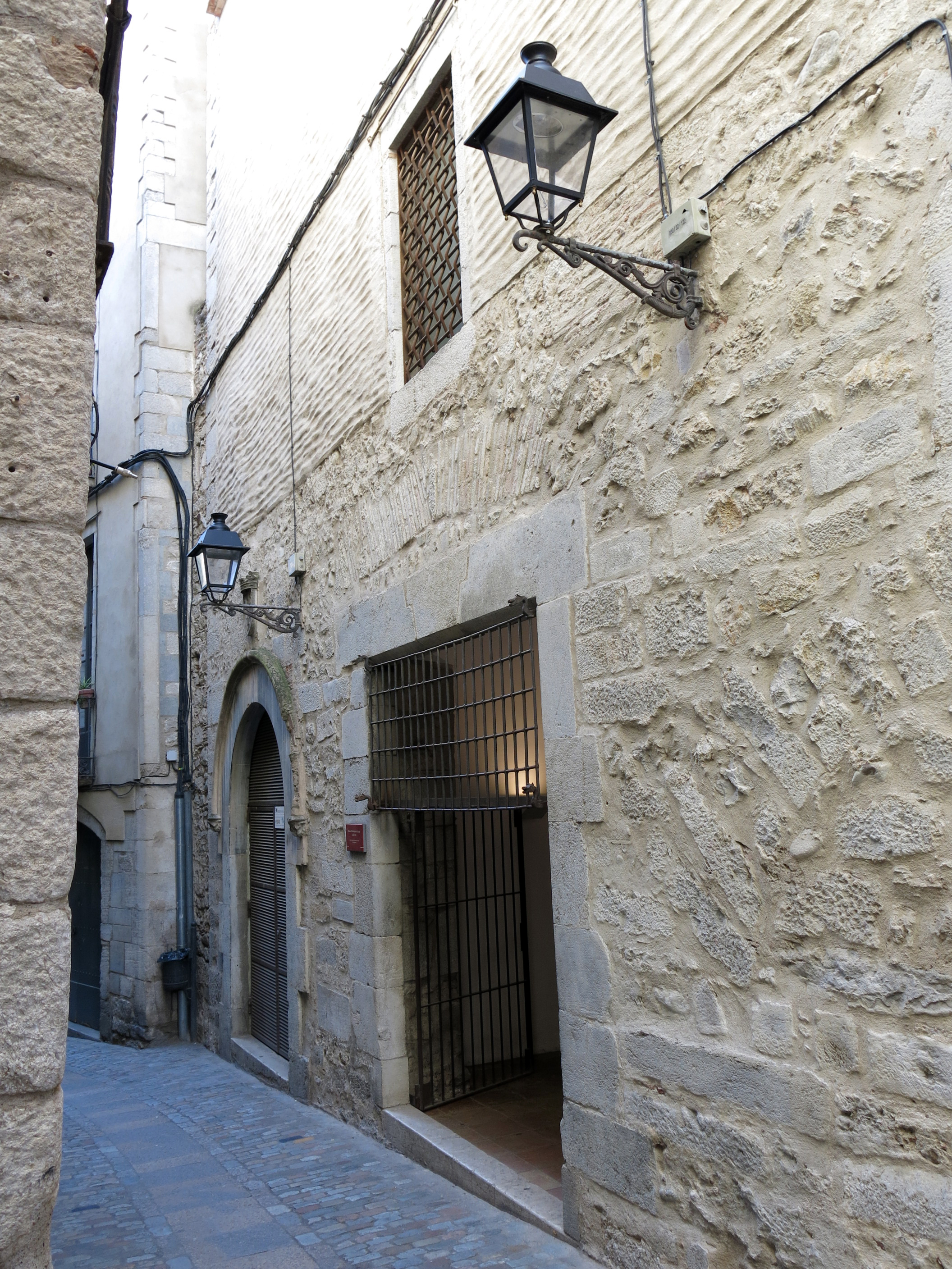 Casa Cartellà (Girona)